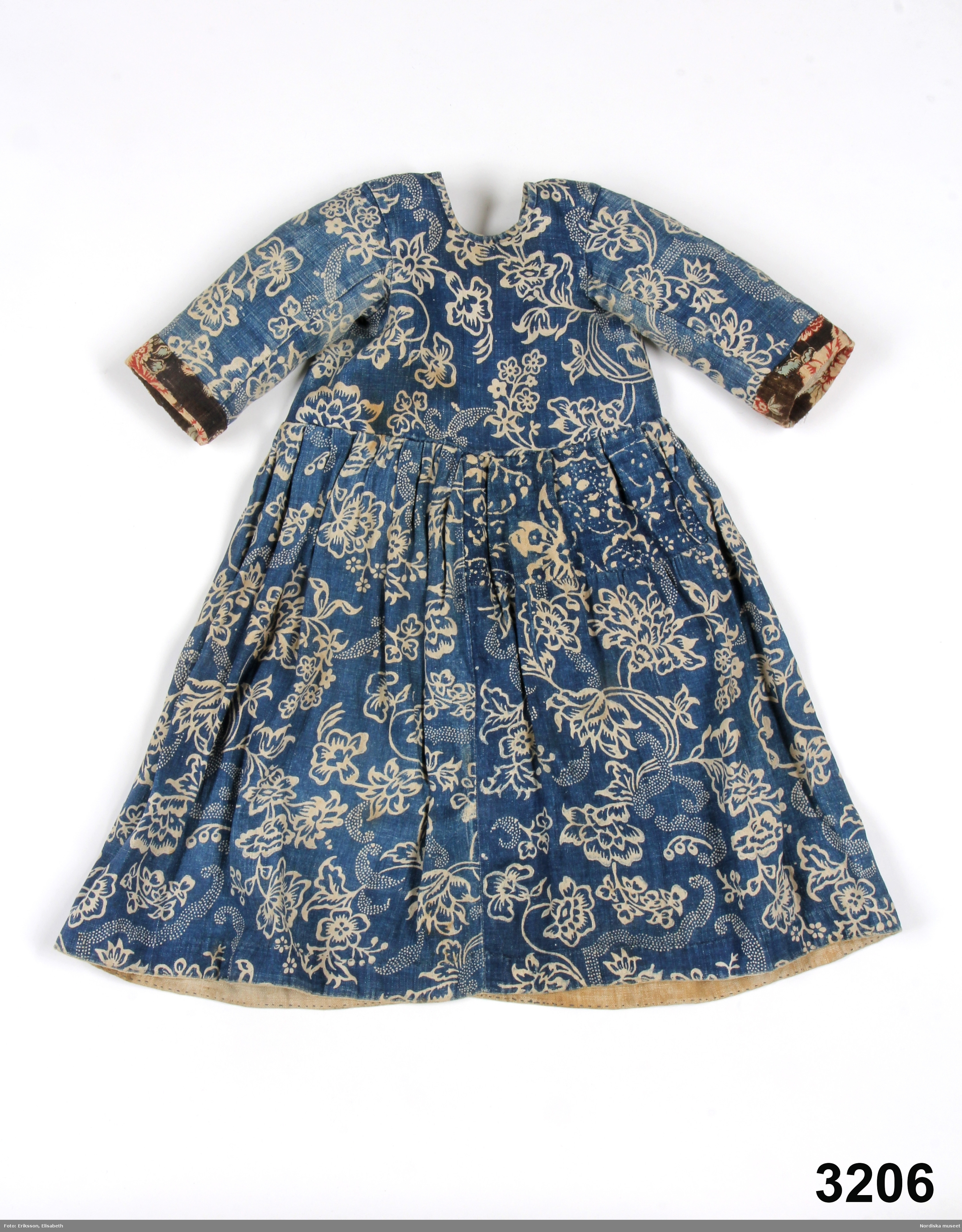 Kolt